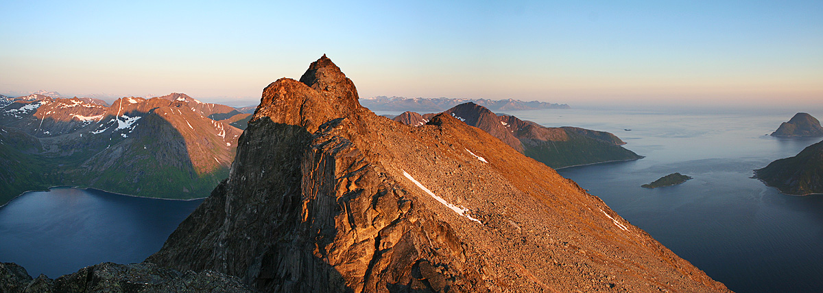 Panoramabilde av Skamtinden fra en nabotopp. Utløpet av Ersfjord i bakgrunnen